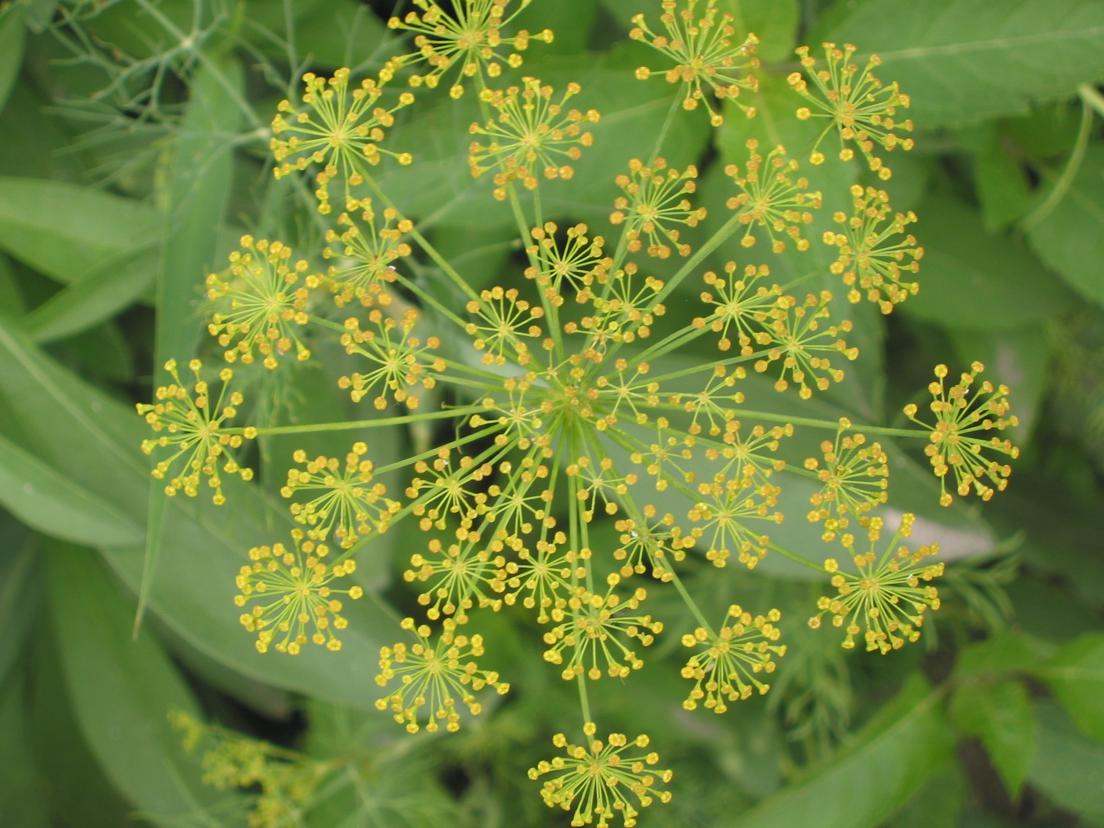 Растение